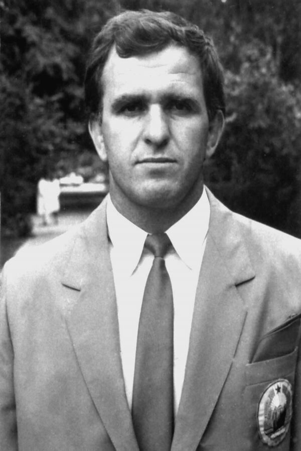 Vasile Pușcașu in Seoul